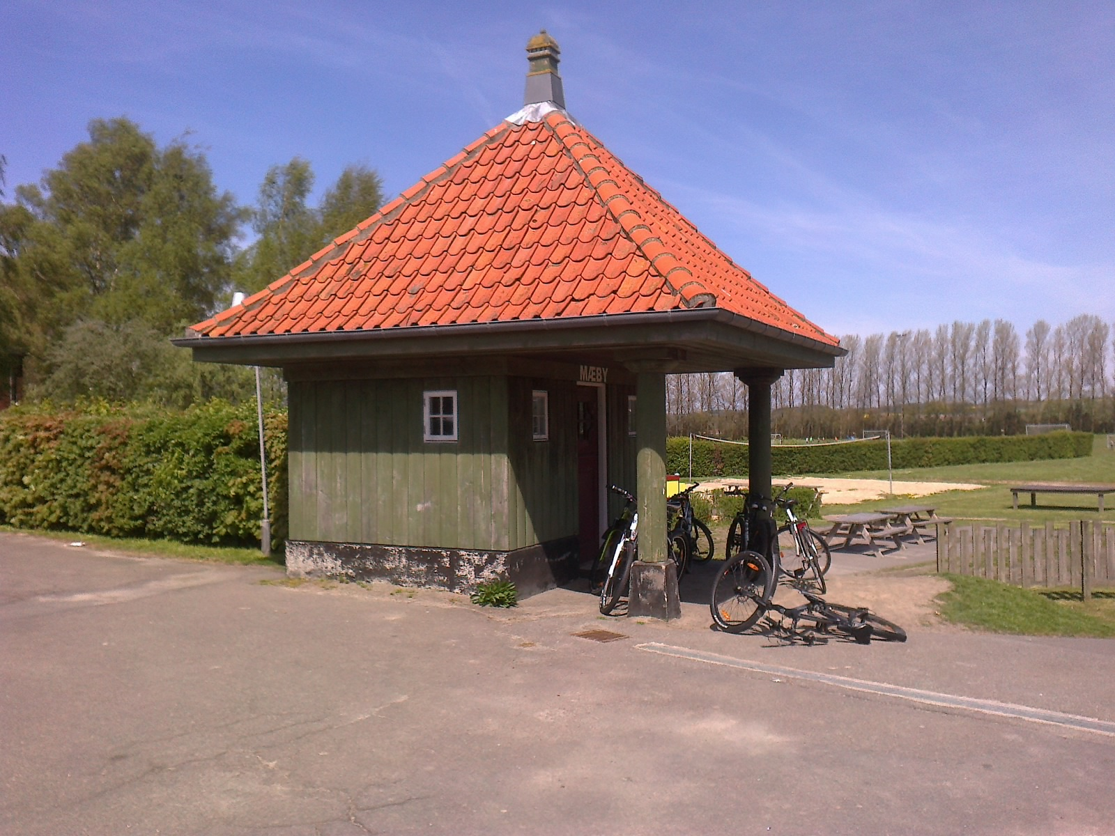 MæbyTrinbræt, i dag placeret på sportspladsen ved Bornholms Frie Idrætsskole